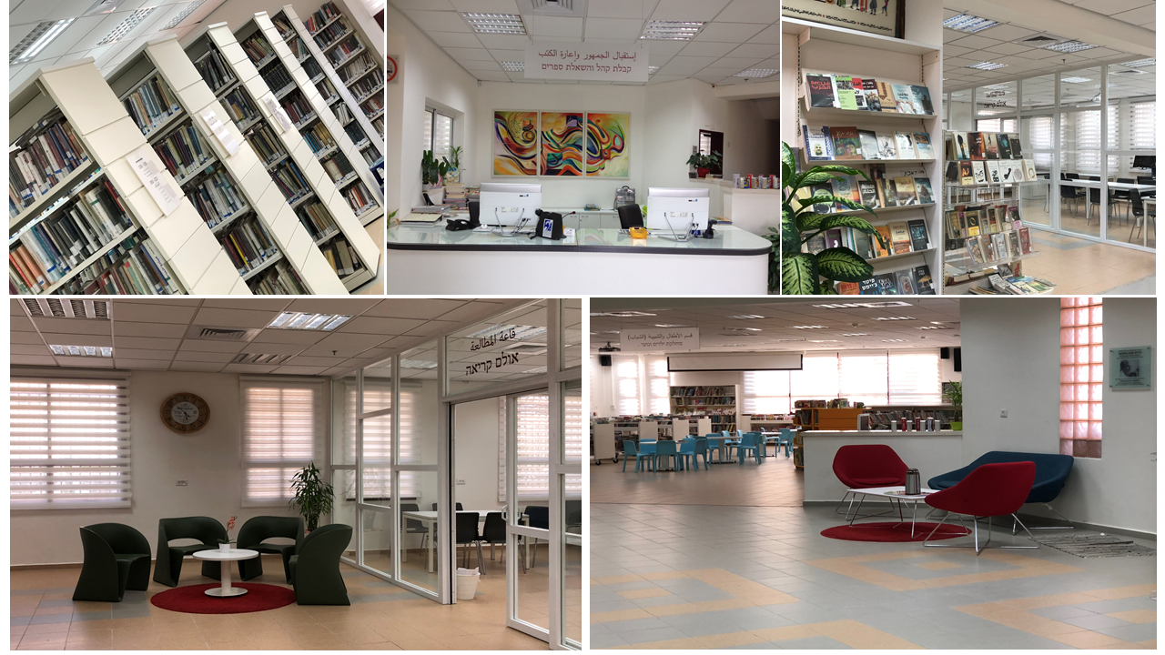 מחלקות הספרייה